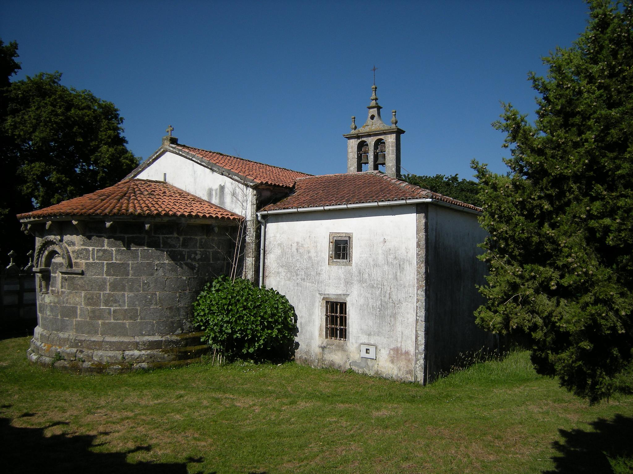 Igrexa de Santa María de Sendelle, no concello de Boimorto